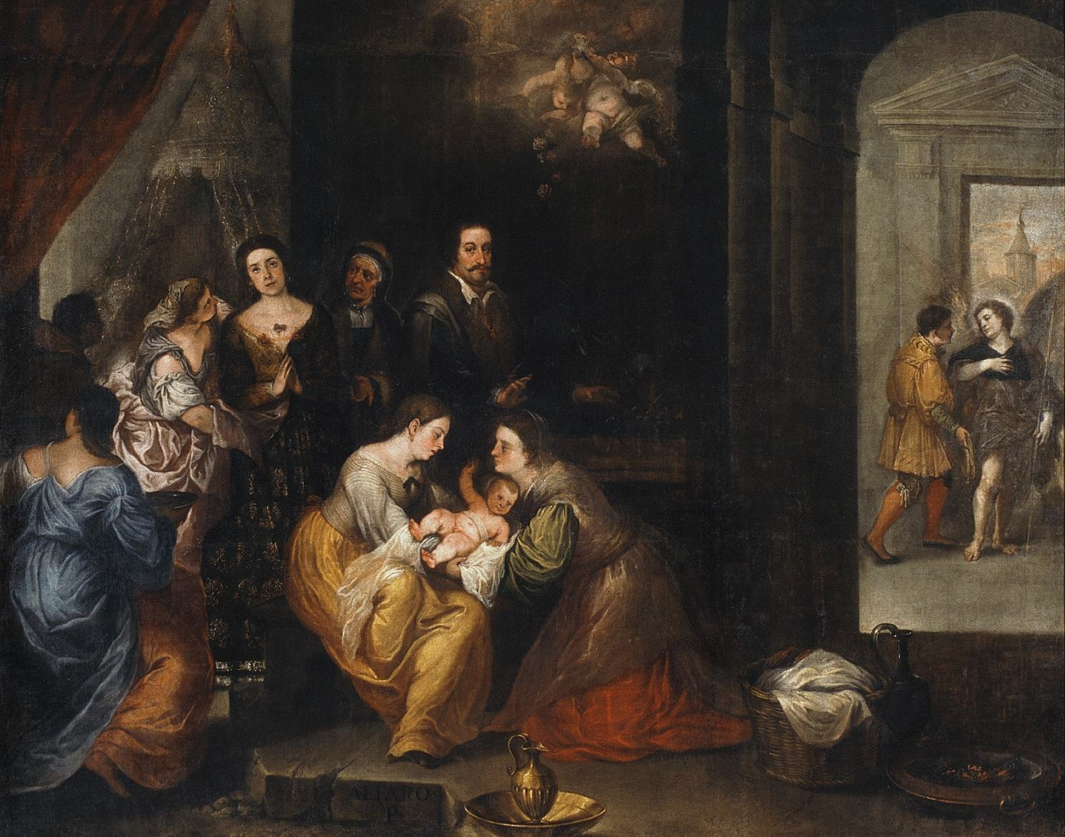 La obra representa el nacimiento de San Francisco de Asís, fundador de la Orden de los franciscanos.